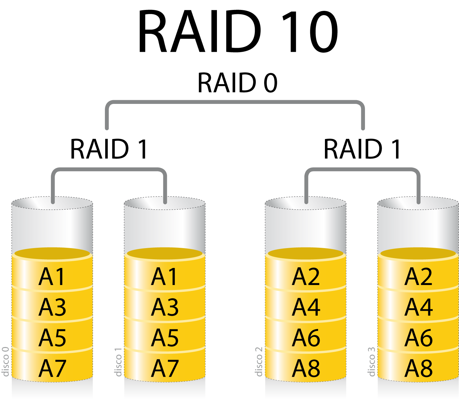 Esquema RAID 10